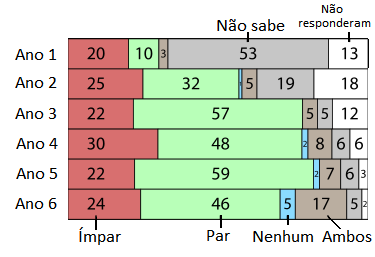 Percentagens de crianças fazendo diferentes escolhas para zero em cada grupo anual